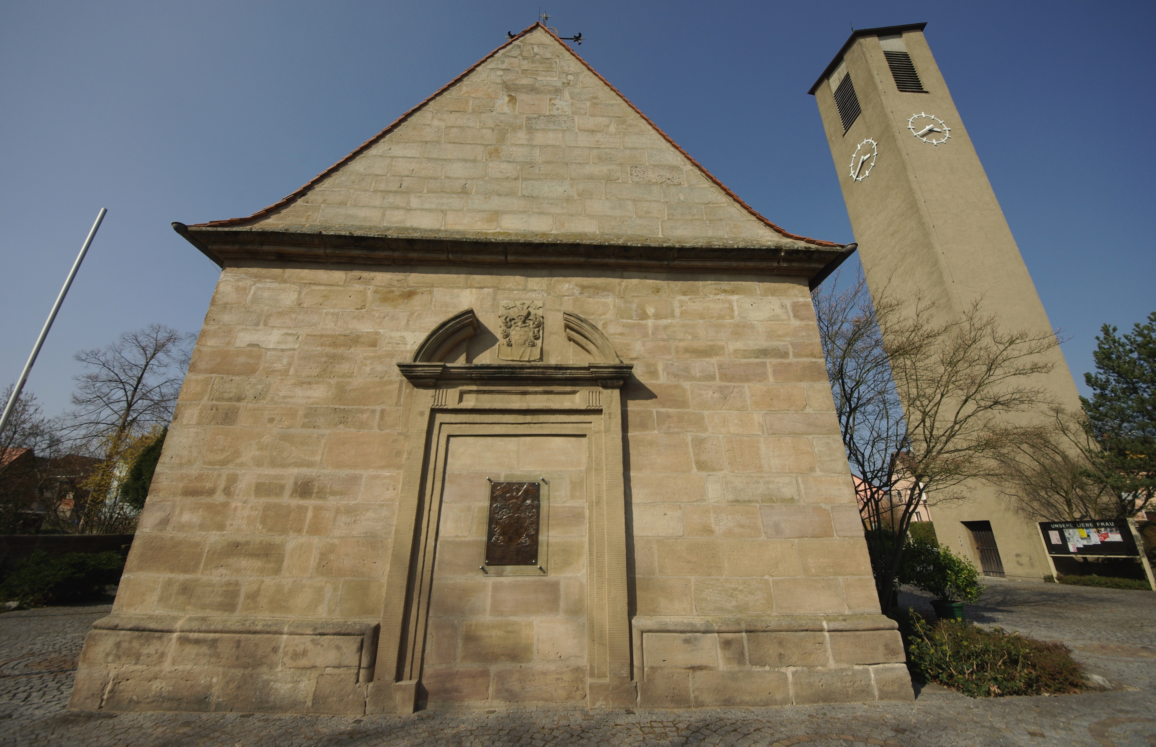 Die ab 1719 errichtete und am 1. Oktober 1730 geweihte Kapelle Maria Schnee sowie der Turm der daran angebauten und am 8. September 1963 geweihten katholischen Kirche Unsere Liebe Frau im Erlanger Stadtteil Dechsendorf